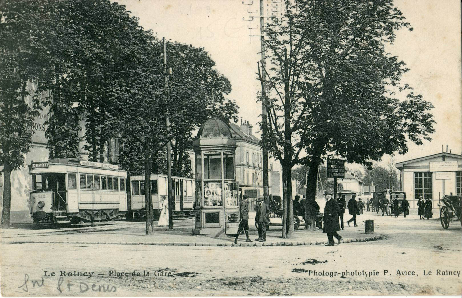 Carte postale ancienne éditée par P. Avice au RaincyLe Raincy - Place de la GareVue à gauche d'une motrice et d'une remorque du Tramway du Raincy à Montfermeil